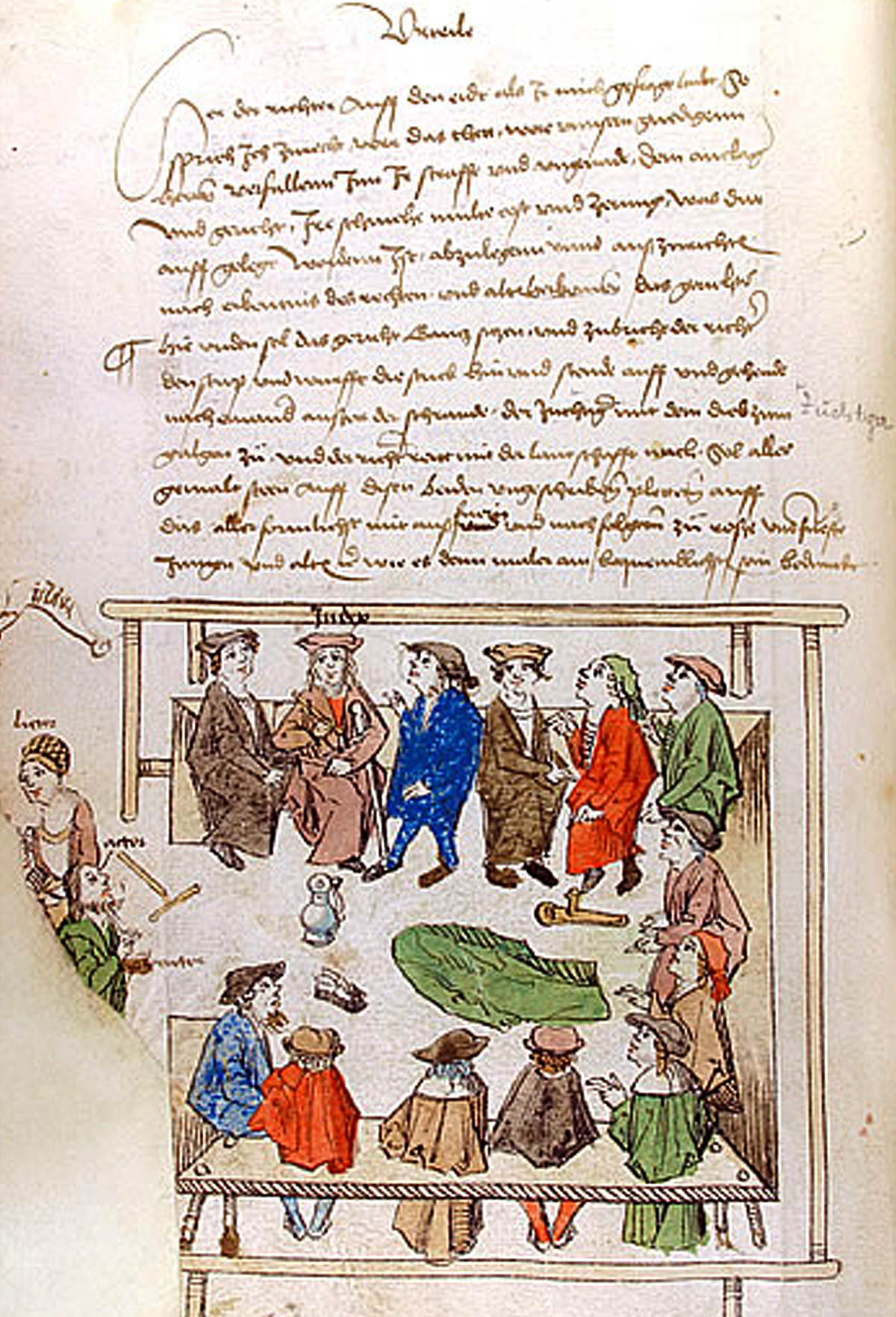 Das Verhör